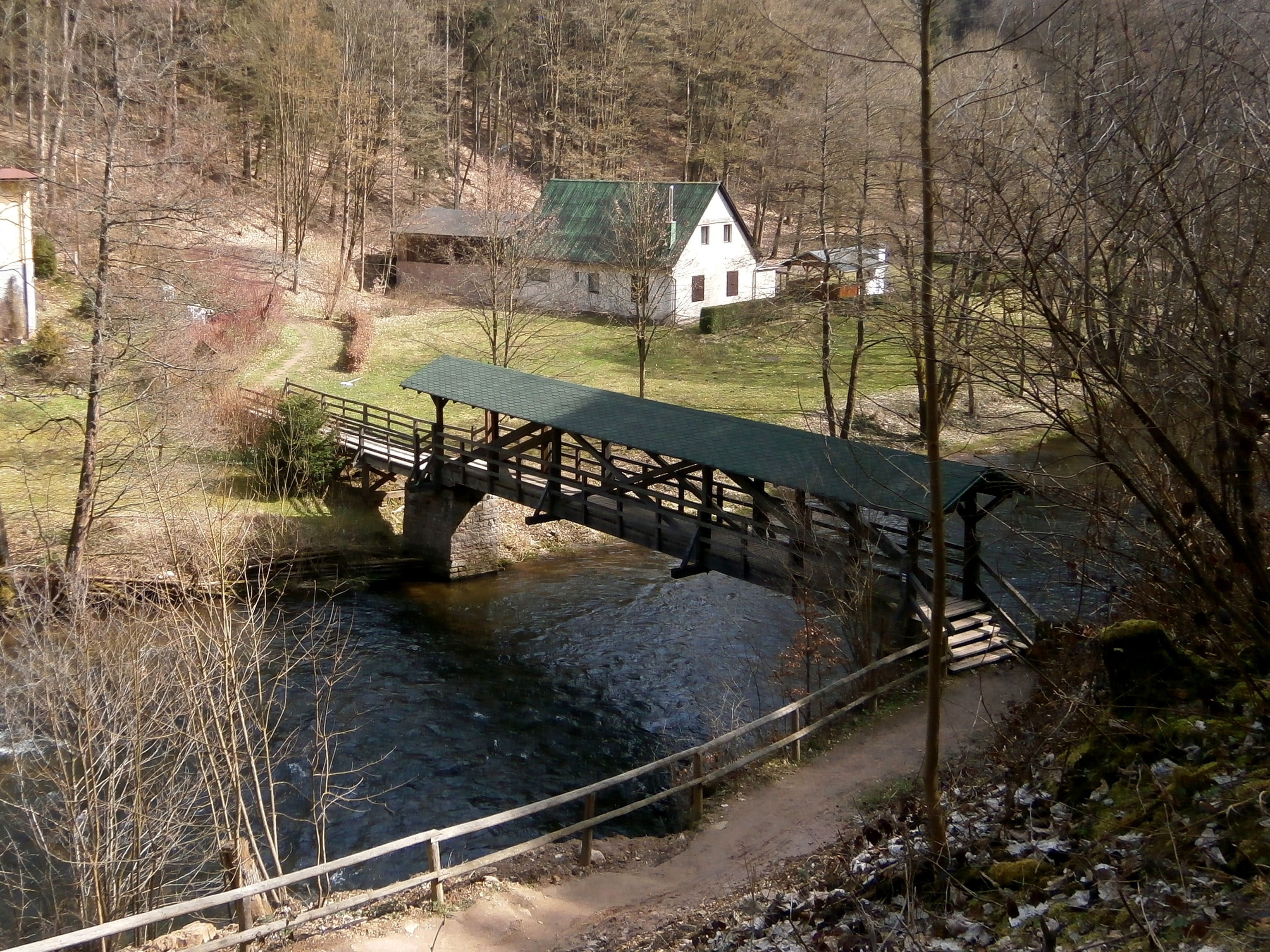 Boušínská lávka přes Úpu